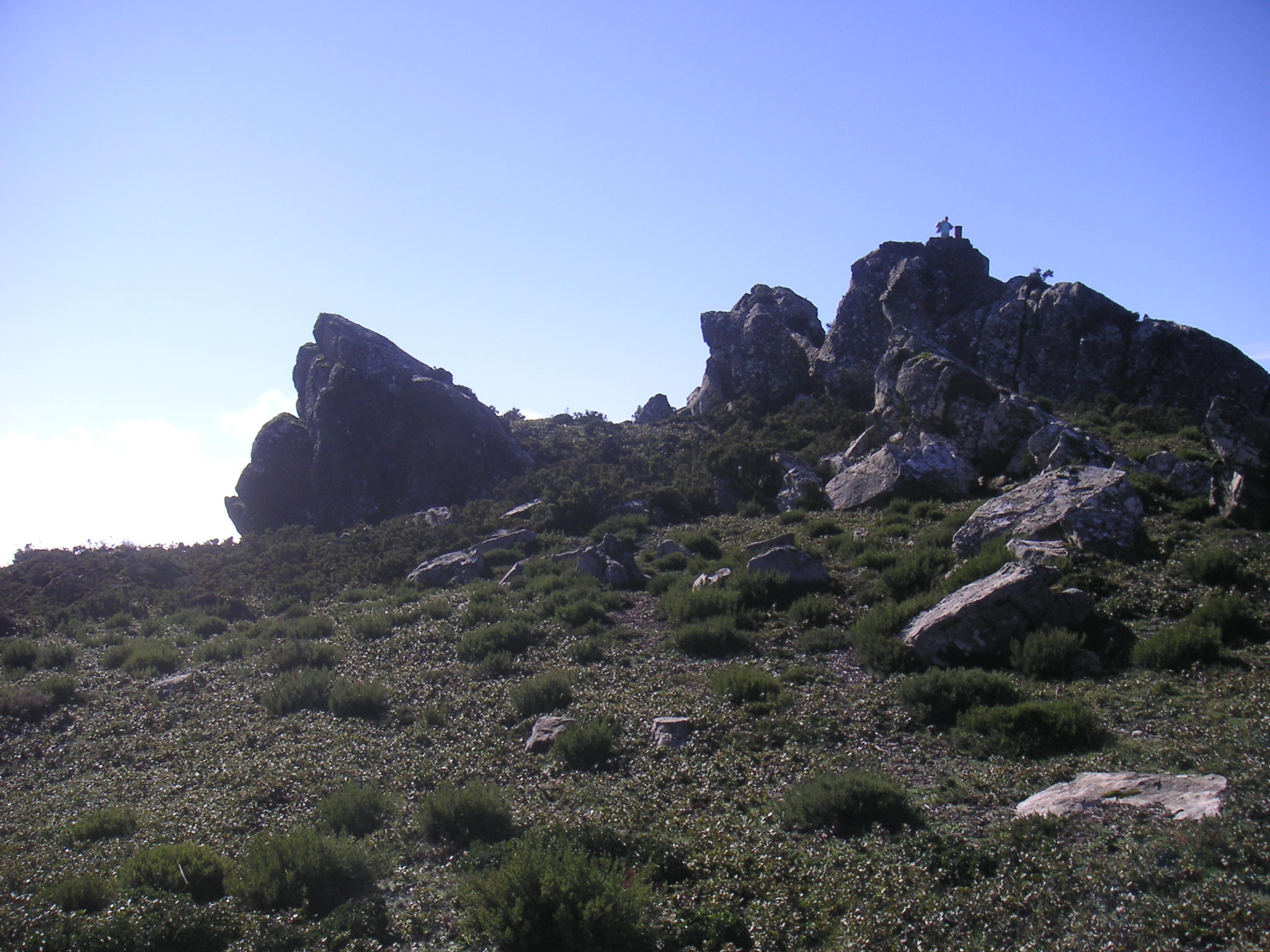 Pico Aljibe